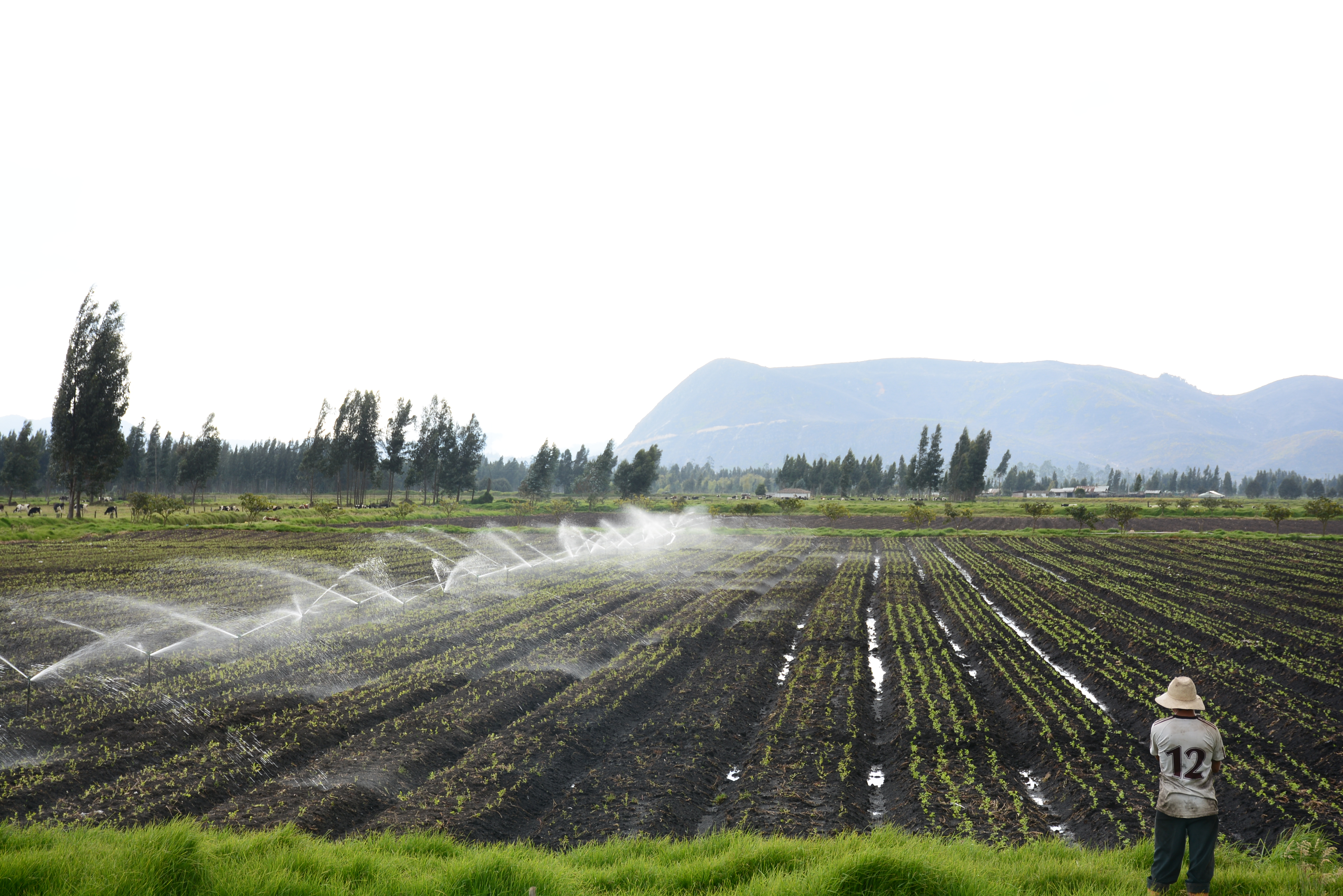 Terrenos de Riego en la Etapa 1 del distrito de Riego y Drenaje de la Ramada. Las aguas que riegan los cultivos y pastizales de Mosquera y municipios colindantes provienen del Distrito de Riego